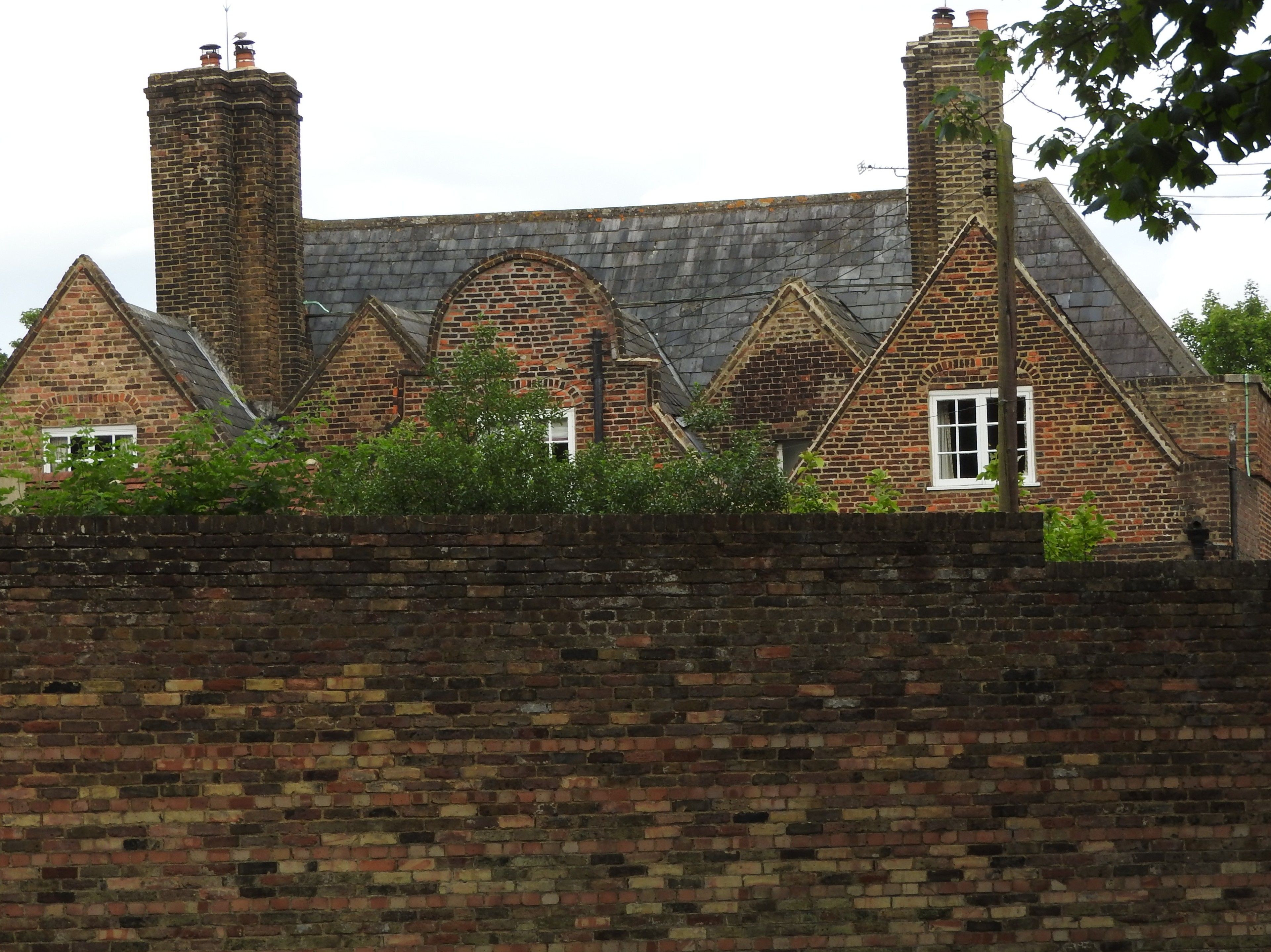 Upnor